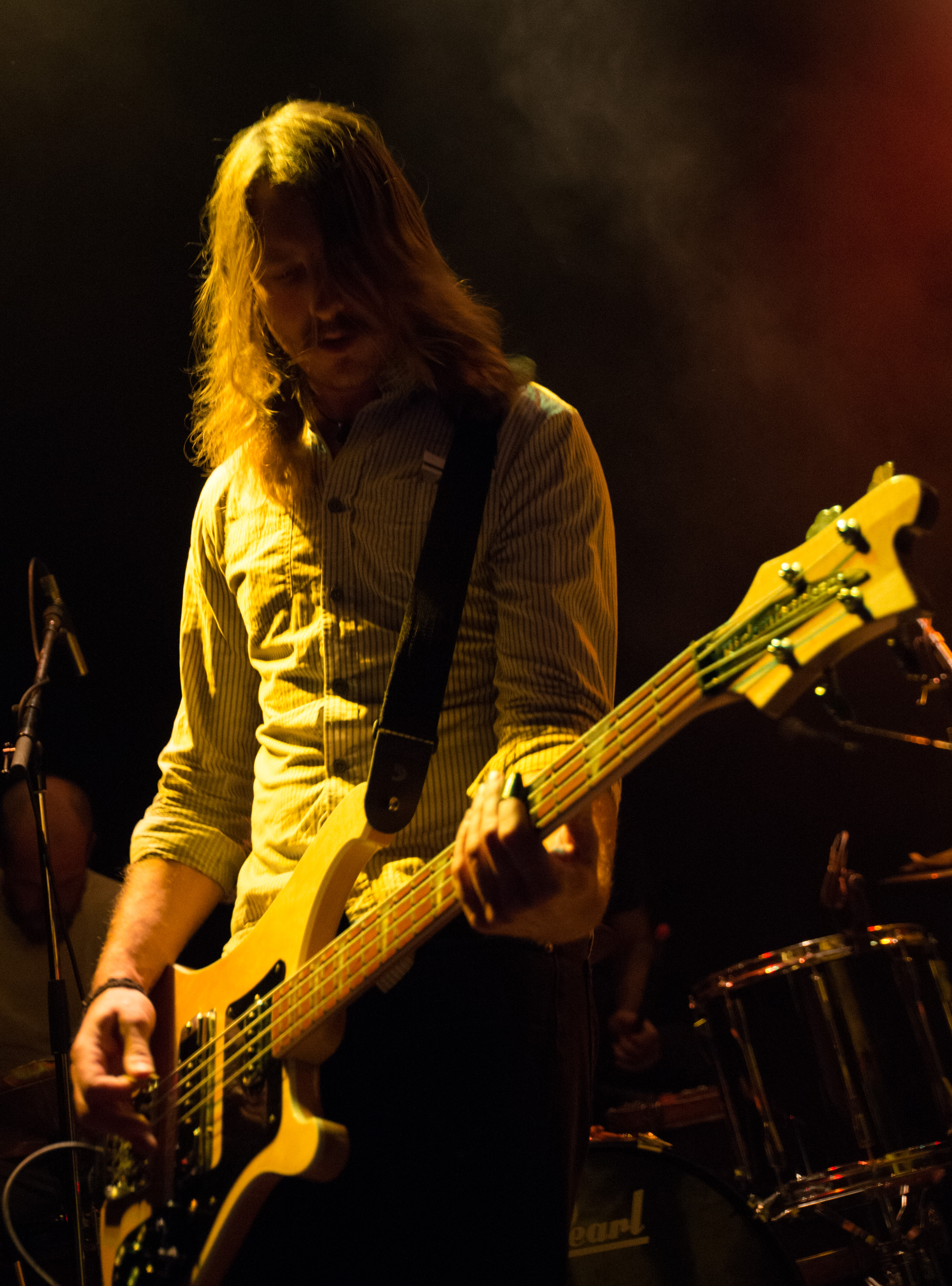 de The Builders and Butchers 2014 Muenchen Kranhalle